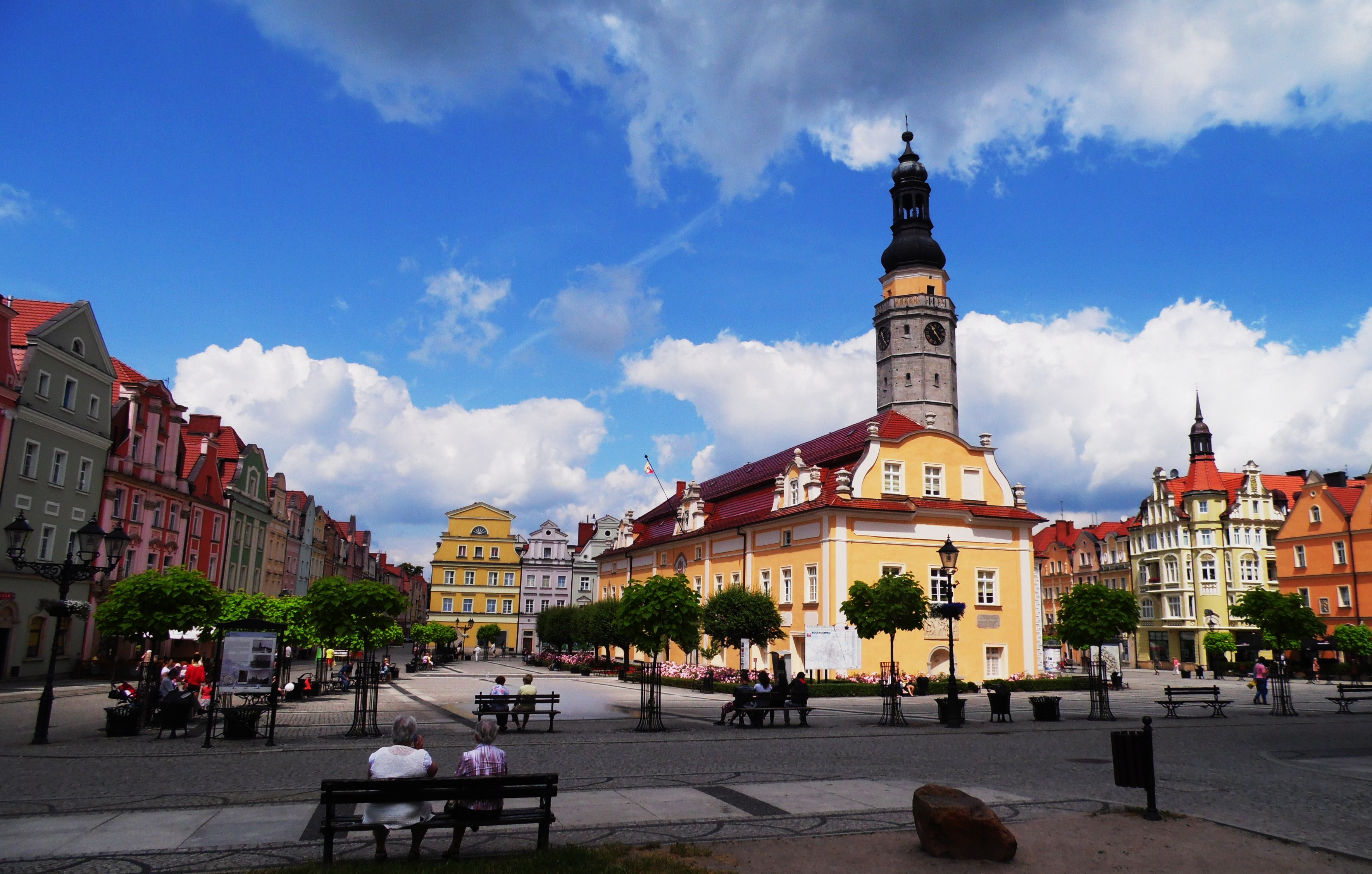 RYNEK STAREGO MIASTA Z RATUSZEM.